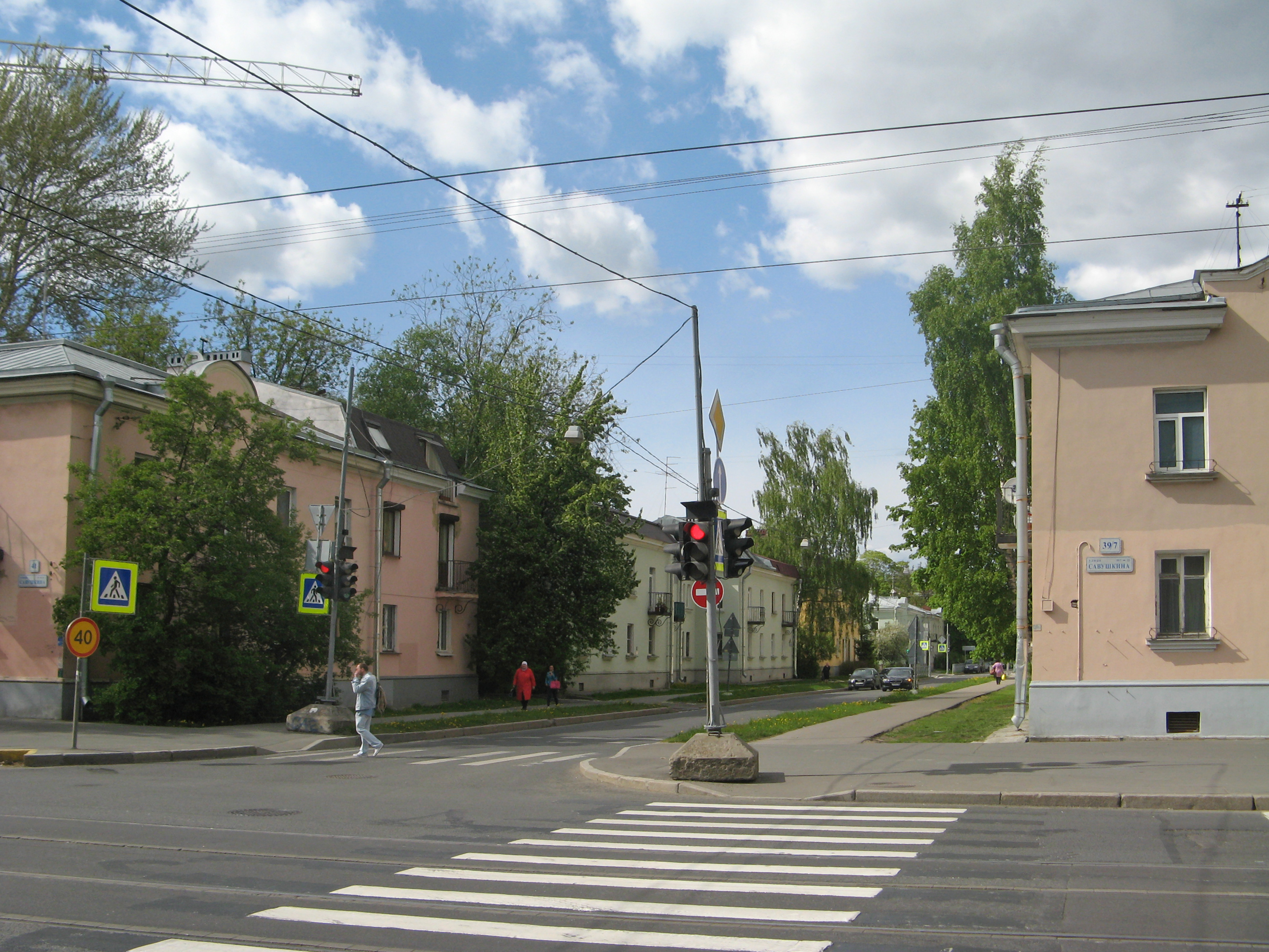 Улица Оскаленко в Санкт-Петербурге